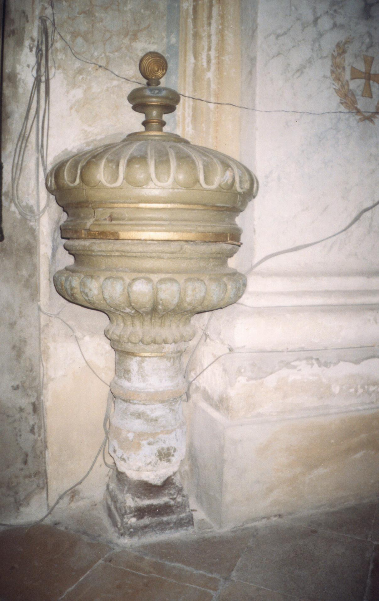 Krstionica u crkvi sv. Jurja u Petrovaradinu